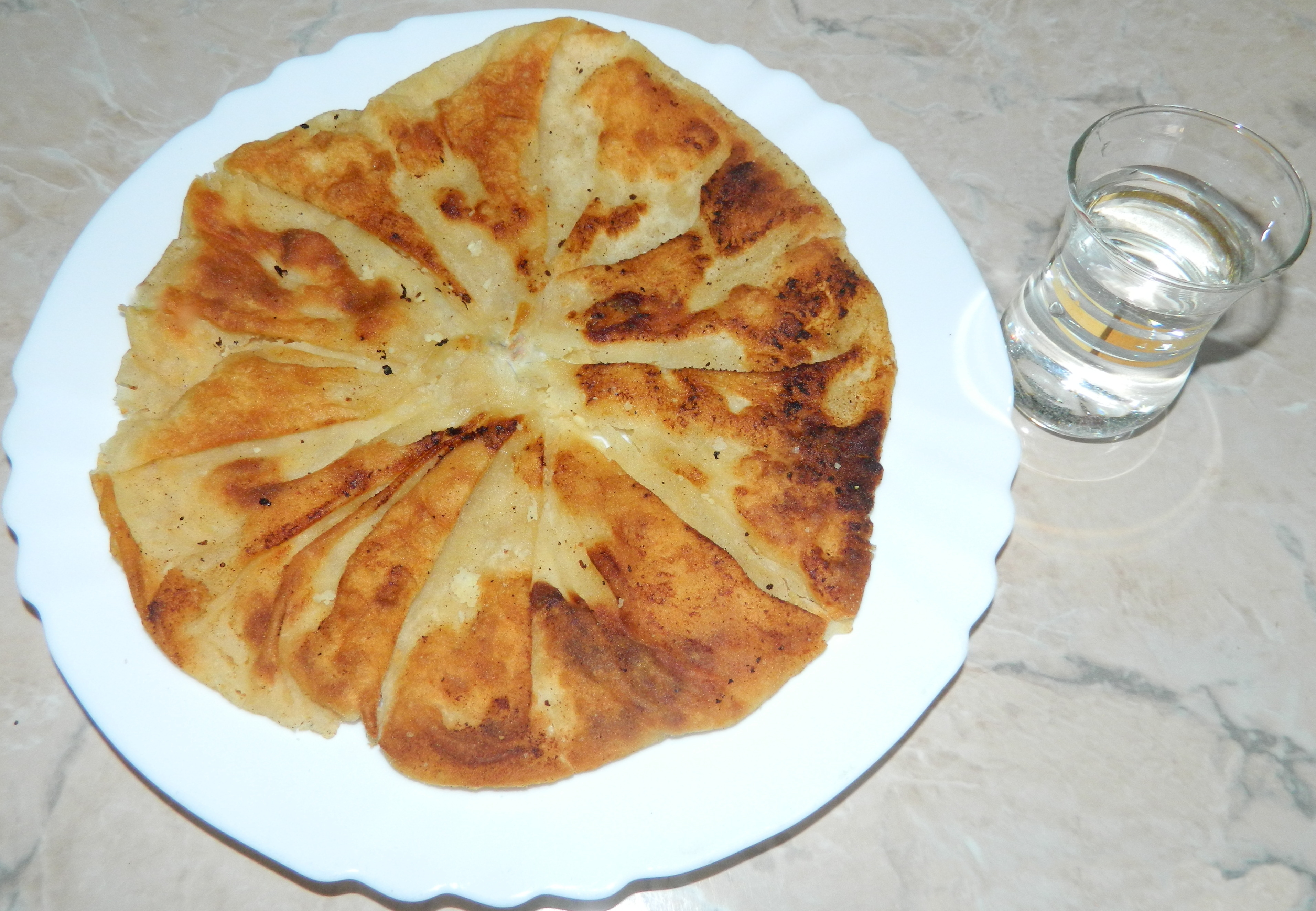 Plăcintă creață cu brânză iute de oaie, Luminișu, Sălaj